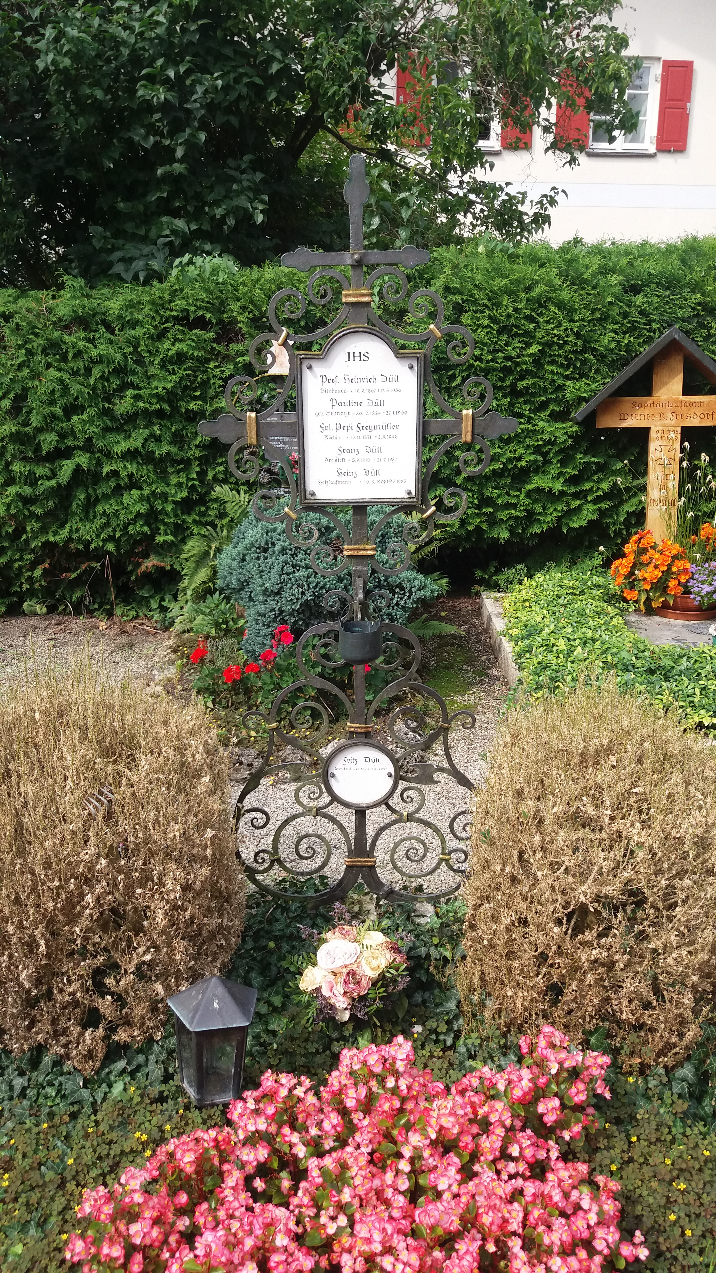 Grabstätte Heinrich Düll auf dem Inselfriedhof Frauenchiemsee